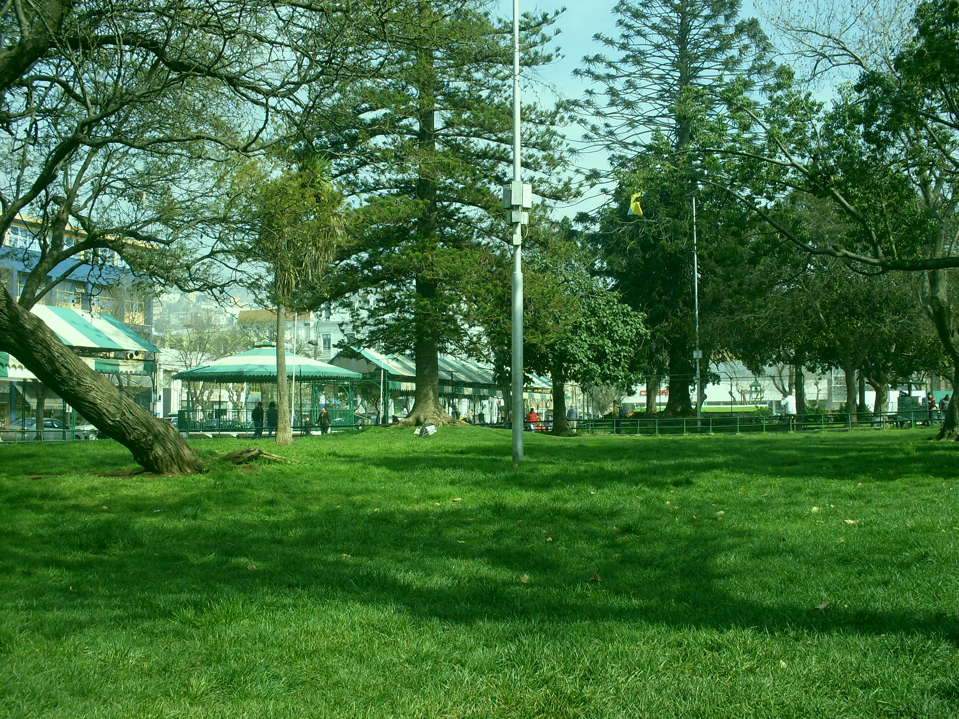 Plaza O'Higgins, ubicada en el plan de la ciudad de Valparaíso, Chile, mirando hacia la intersección de las calles Victoria y Uruguay.